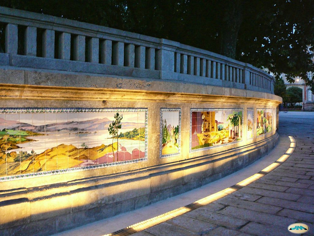 Pontevedra-Alameda-Esmaltes de Carlos Sobrino